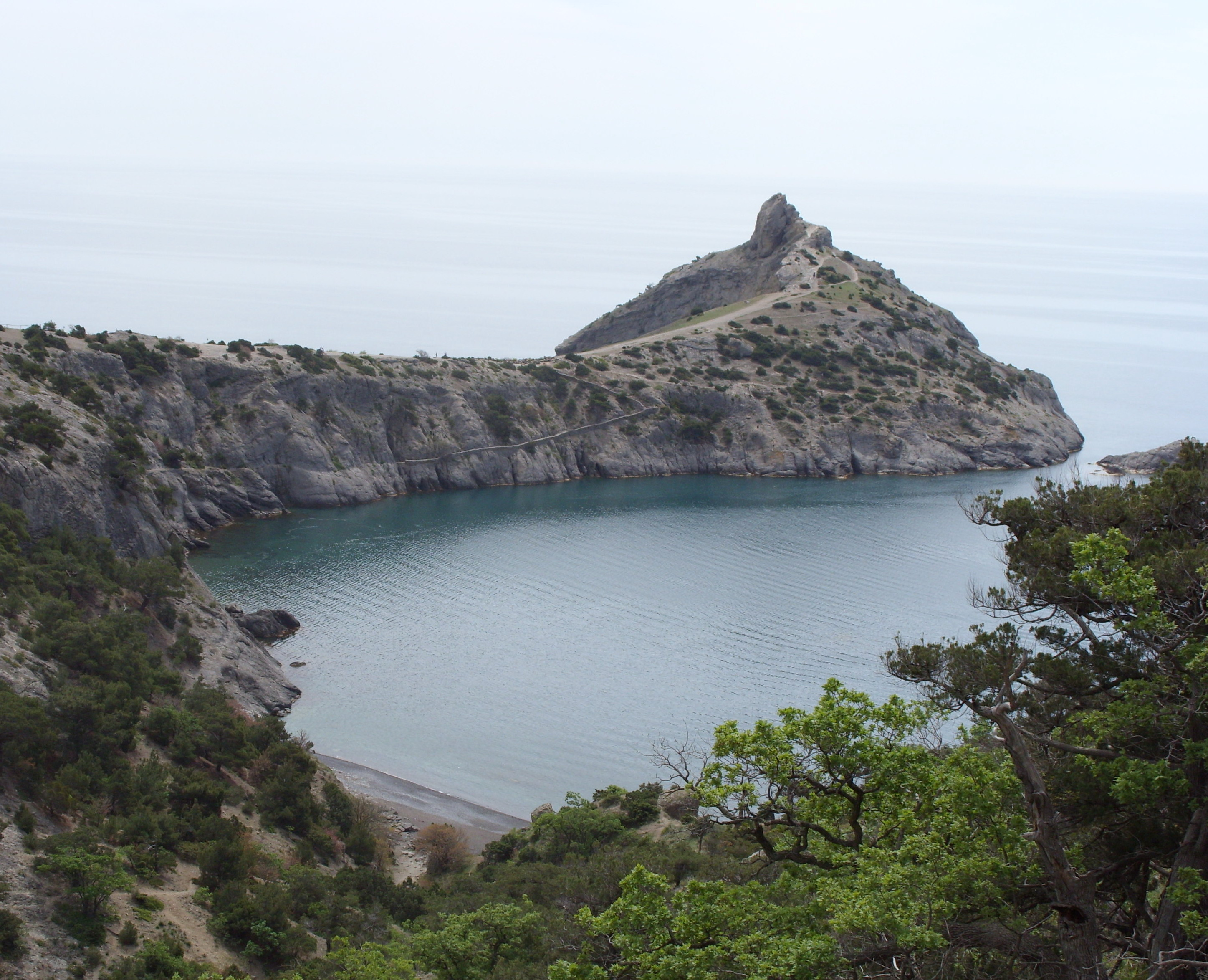 Капчик